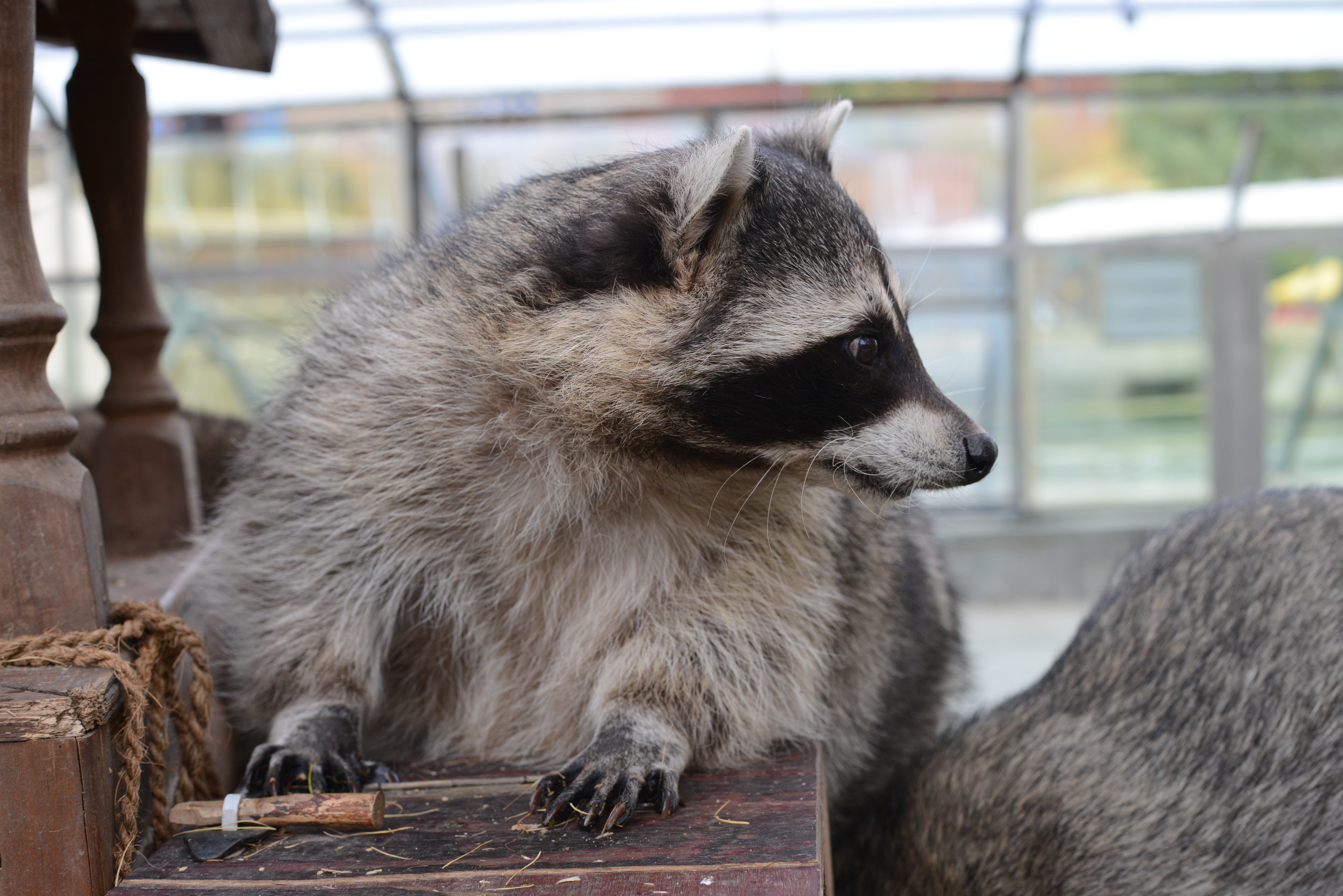 Енот-полоскун